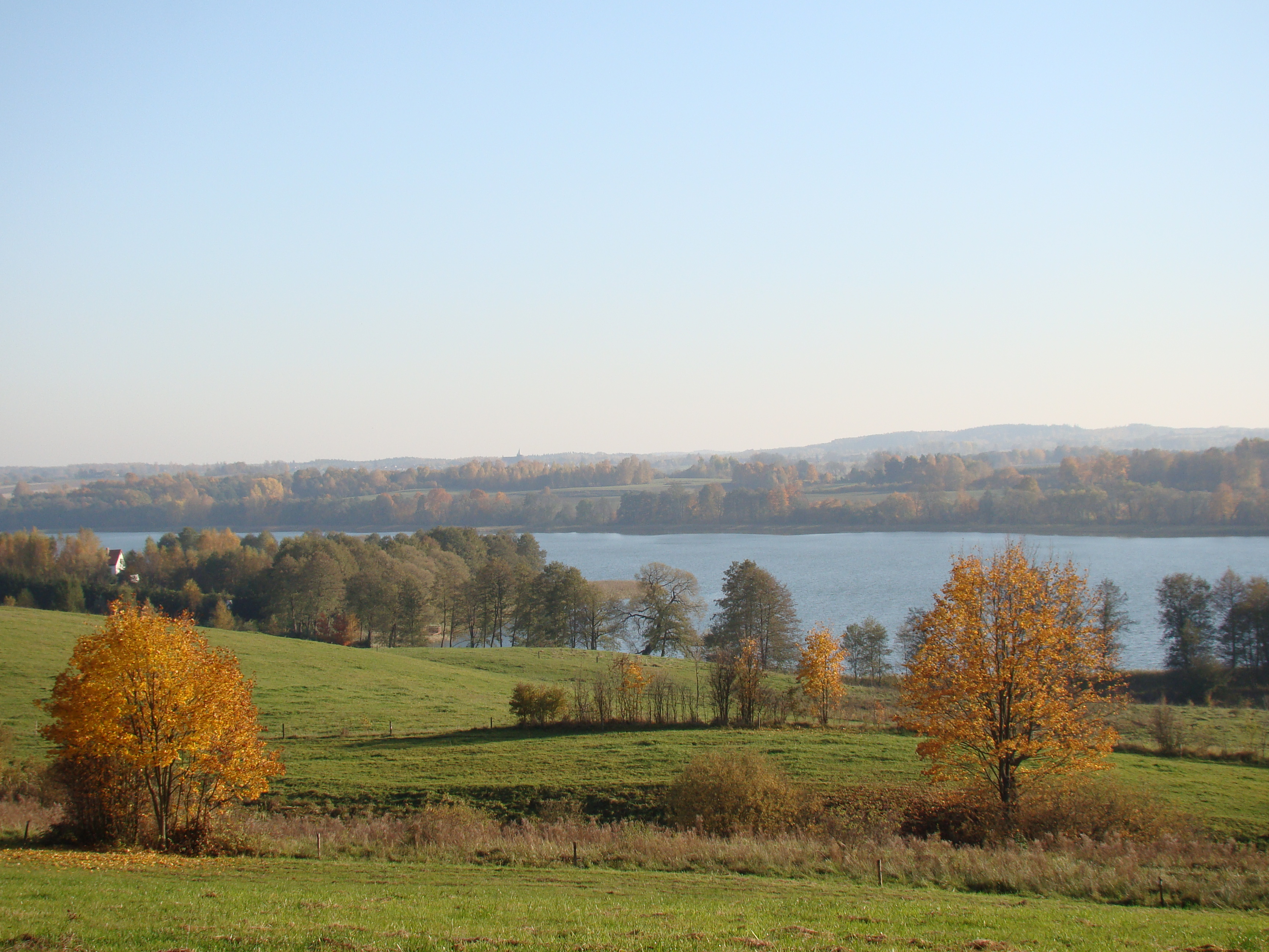 jezioro Blanki jesienią